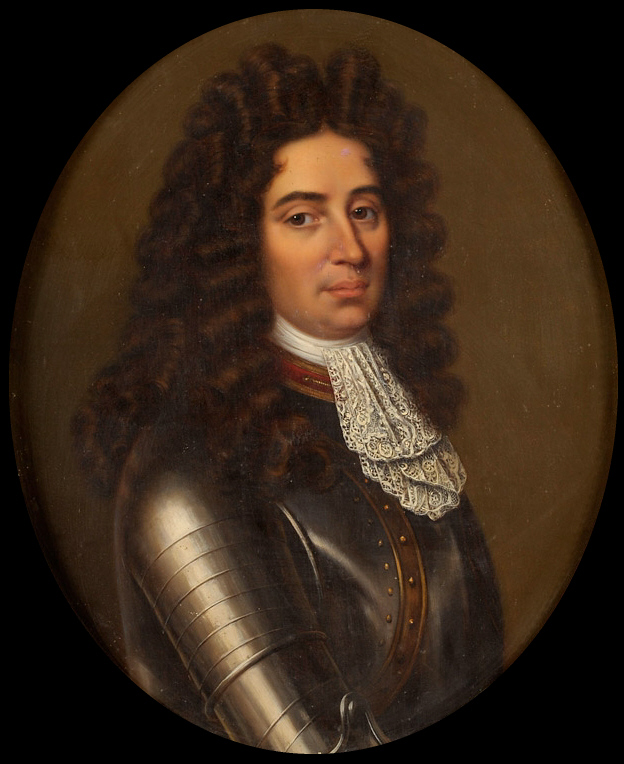 Porträt eines Edelherrn. Laut rückseitiger Bezeichnung: Baron Marc A. v. Auglure v. Bellay u. Savigny, Prinz zu Yvetot. (Marc Antoine Saladin d'Anglure du Bellay de Savigny; Marquis d'Anglure, Comte d'Estoges, Prince d'Yvetot, Marquis du Bellay; 1640–1688).